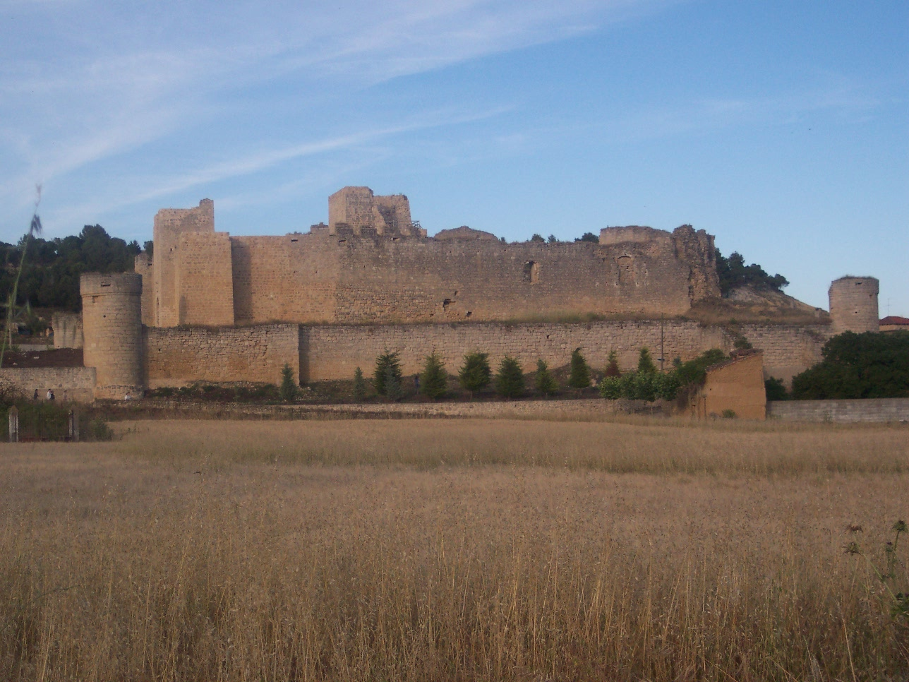 Castillo de Trigueros del Valle, en Valladolid, Castilla.